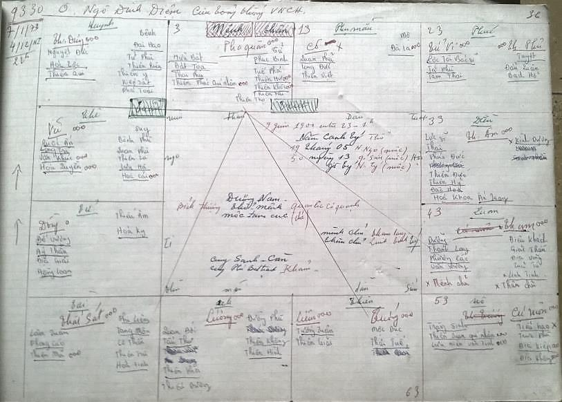 N Đ Diệm2